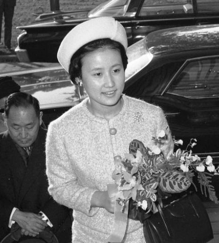 Bezoek van prins Hitachi van Japan en zijn echtgenote prinses Hitachi (Hanako Tsugaru) aan de Japanse consul-generaal in Nederland.